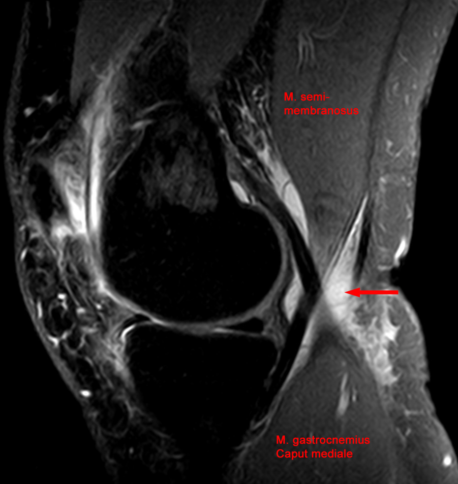 Bakerzyste MRT sagittal mit Durchtrittsstelle (Pfeil) zwischen M. semimembranosus und M. gastrocnemius Caput mediale.